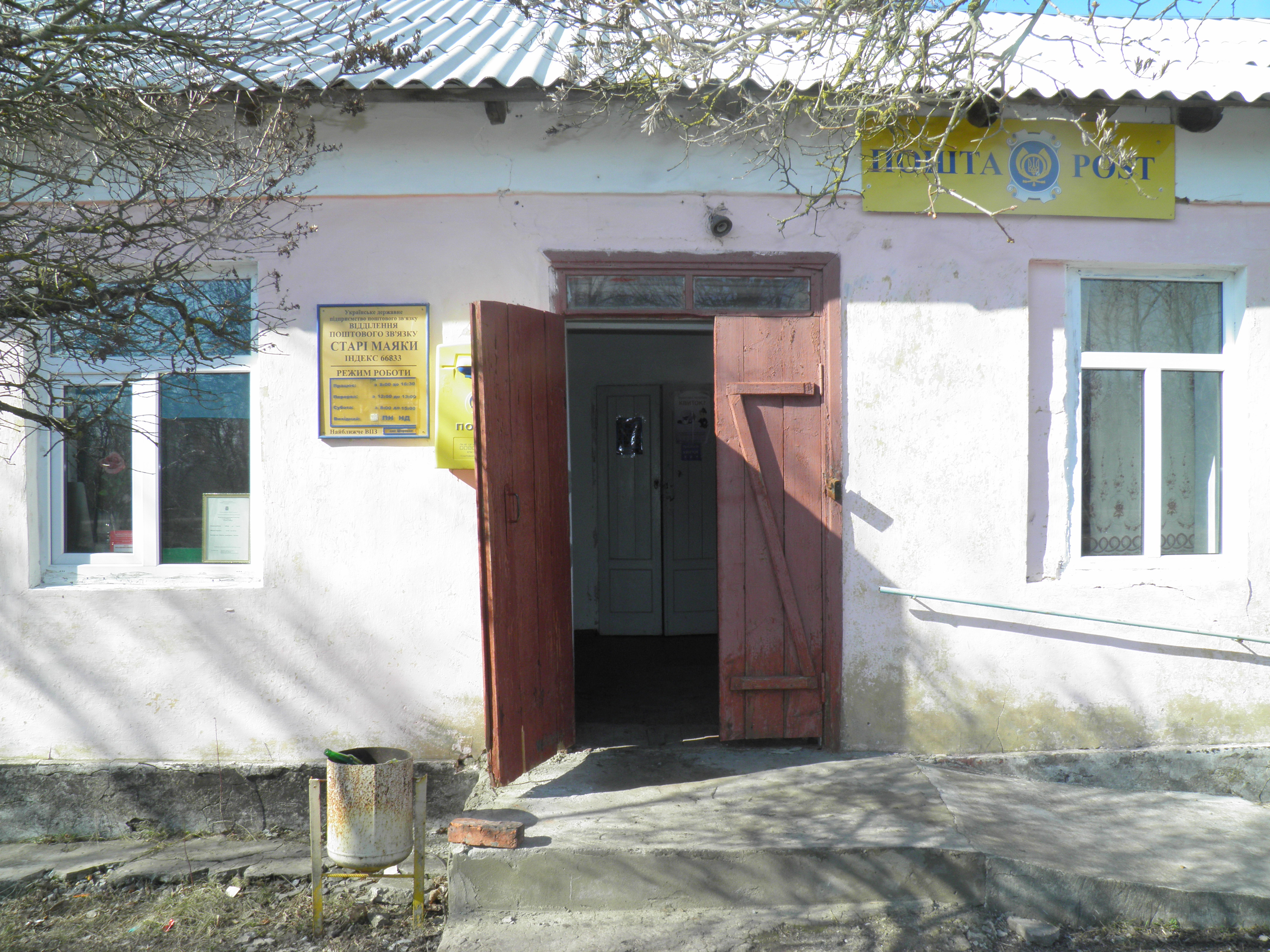 Почтовое отделение в с. Старые Маяки